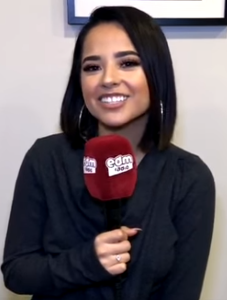 Becky G manda un saludo a EDM Radio